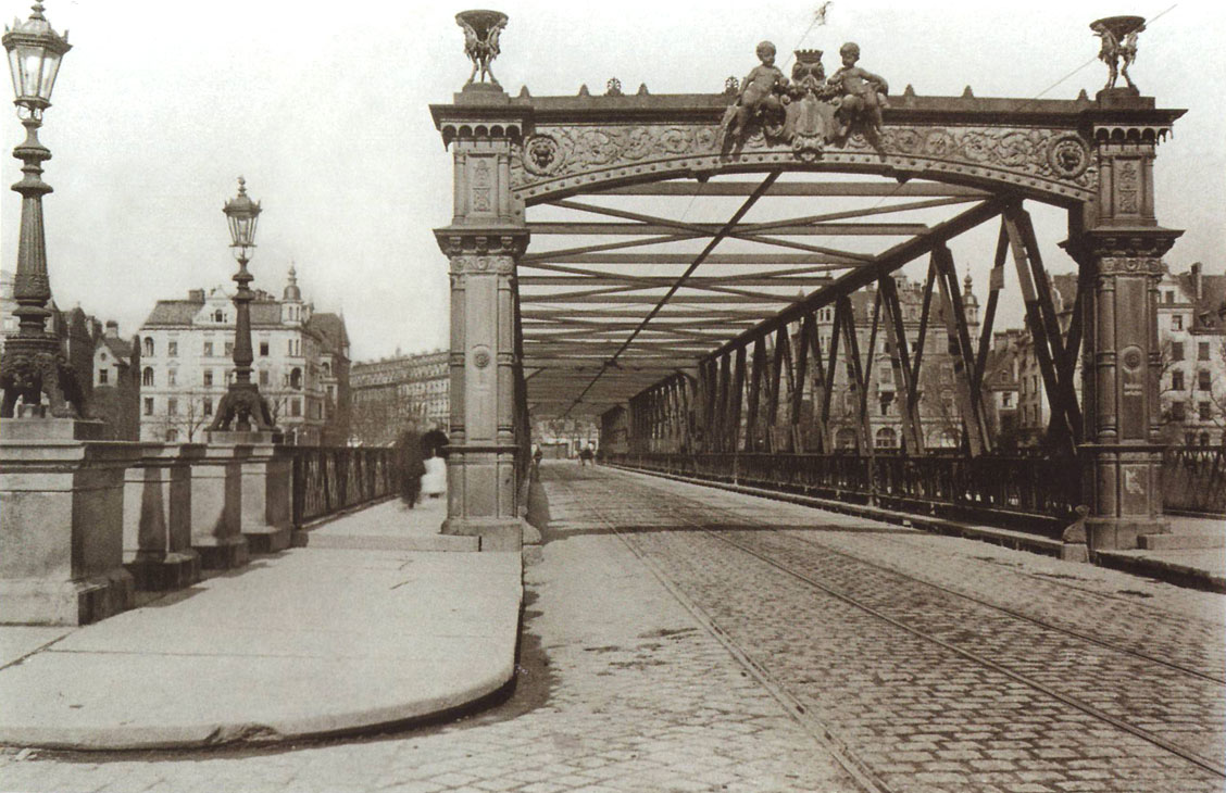 Die Wittelsbacherbrücke